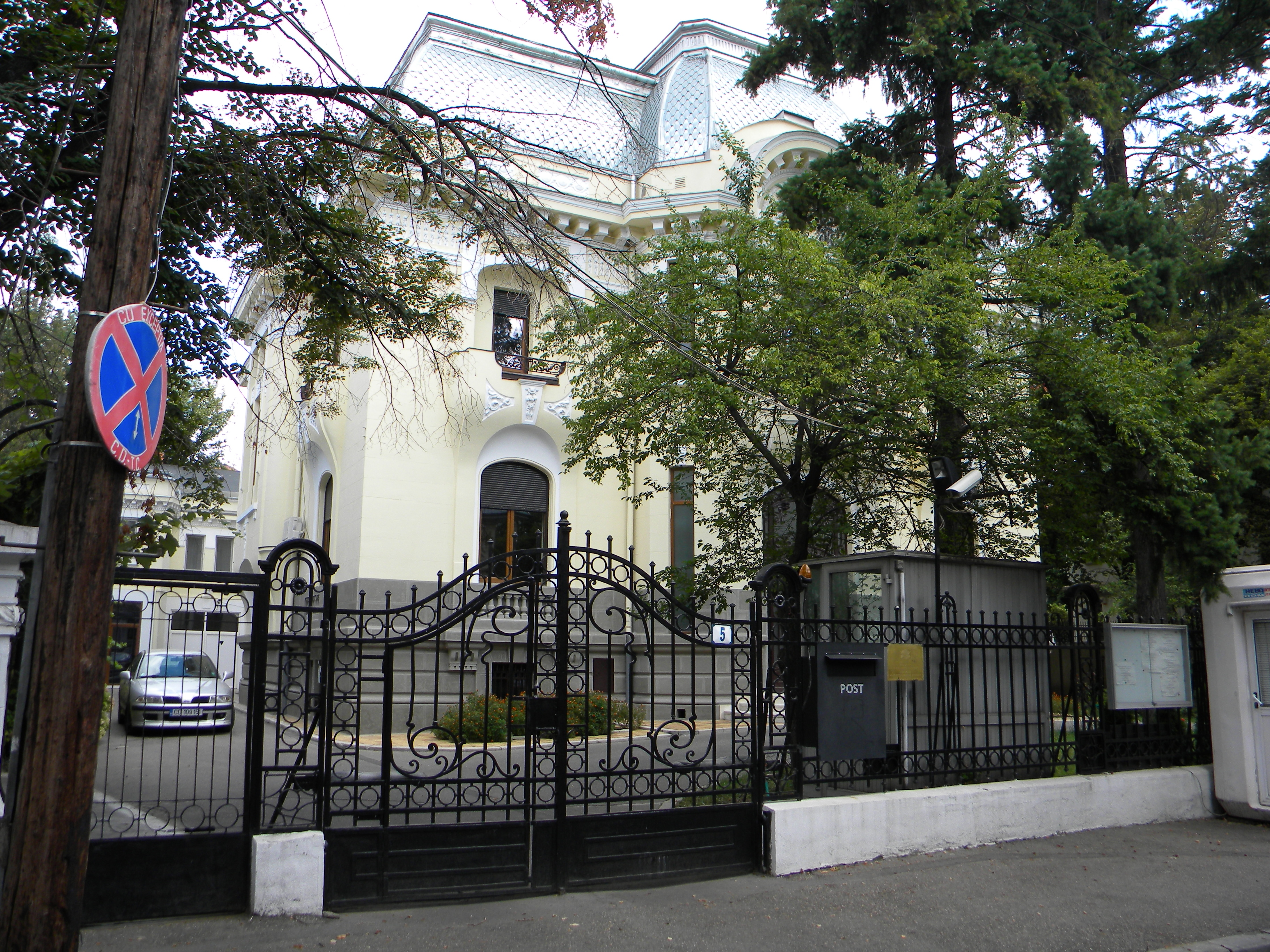 Bucuresti, Romania, Str. Rabat nr. 5, sect. 1, (Vila); B-II-m-B-19492